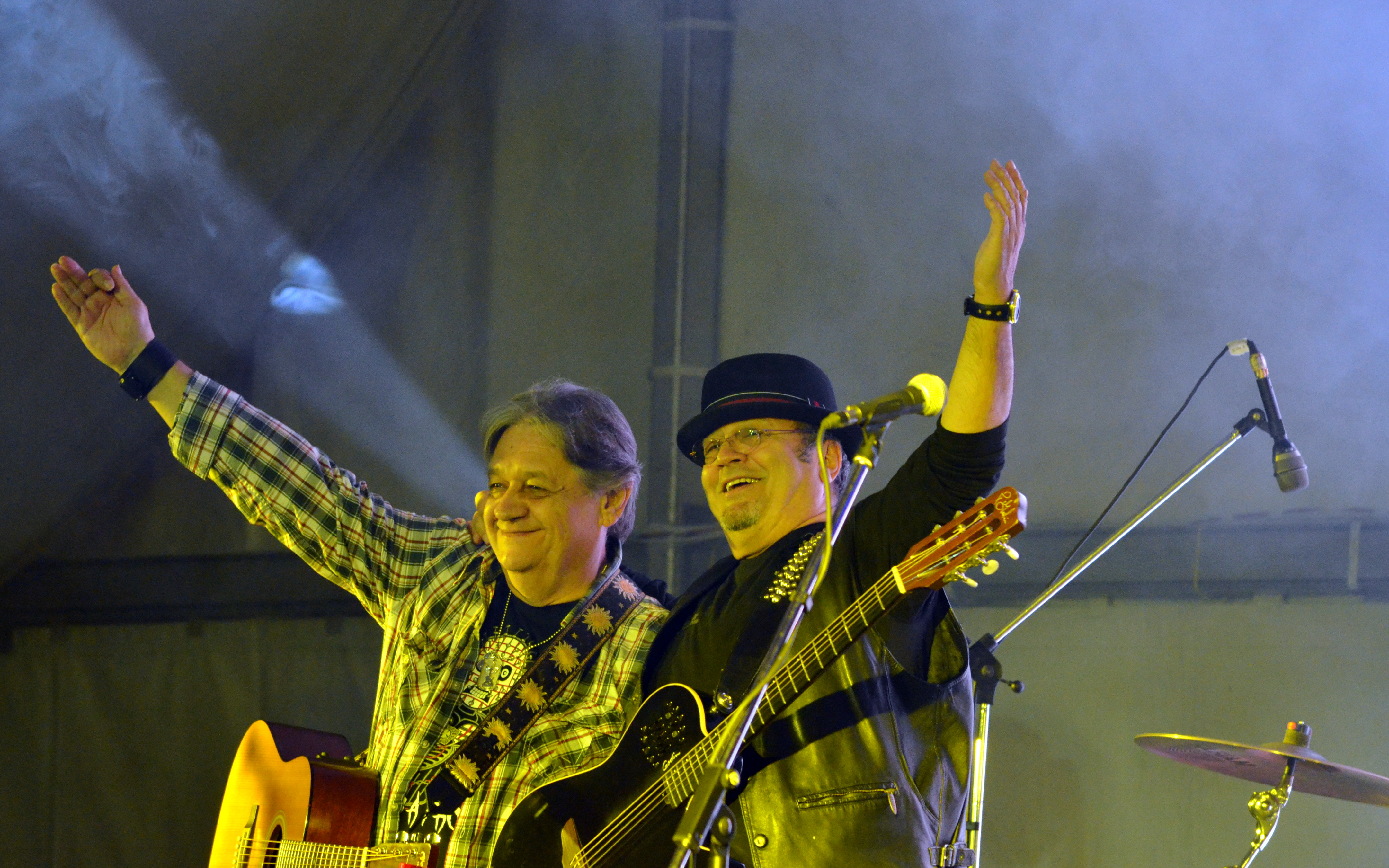 Mircea Vintilă and Mircea Baniciu Pasărea Colibri concert, at Bier Zone Fest 2012